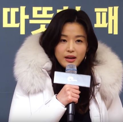 전지현이 12일 오후 서울 중구 소공동 서울 웨스틴 조선호텔에서 열린 브랜드 행사에 참석했다.